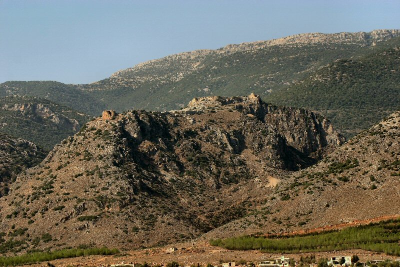 Bourzey Burg Fotograf: Mewes Quelle: eigenes Foto Datum: 2004 Lizenz: public domain